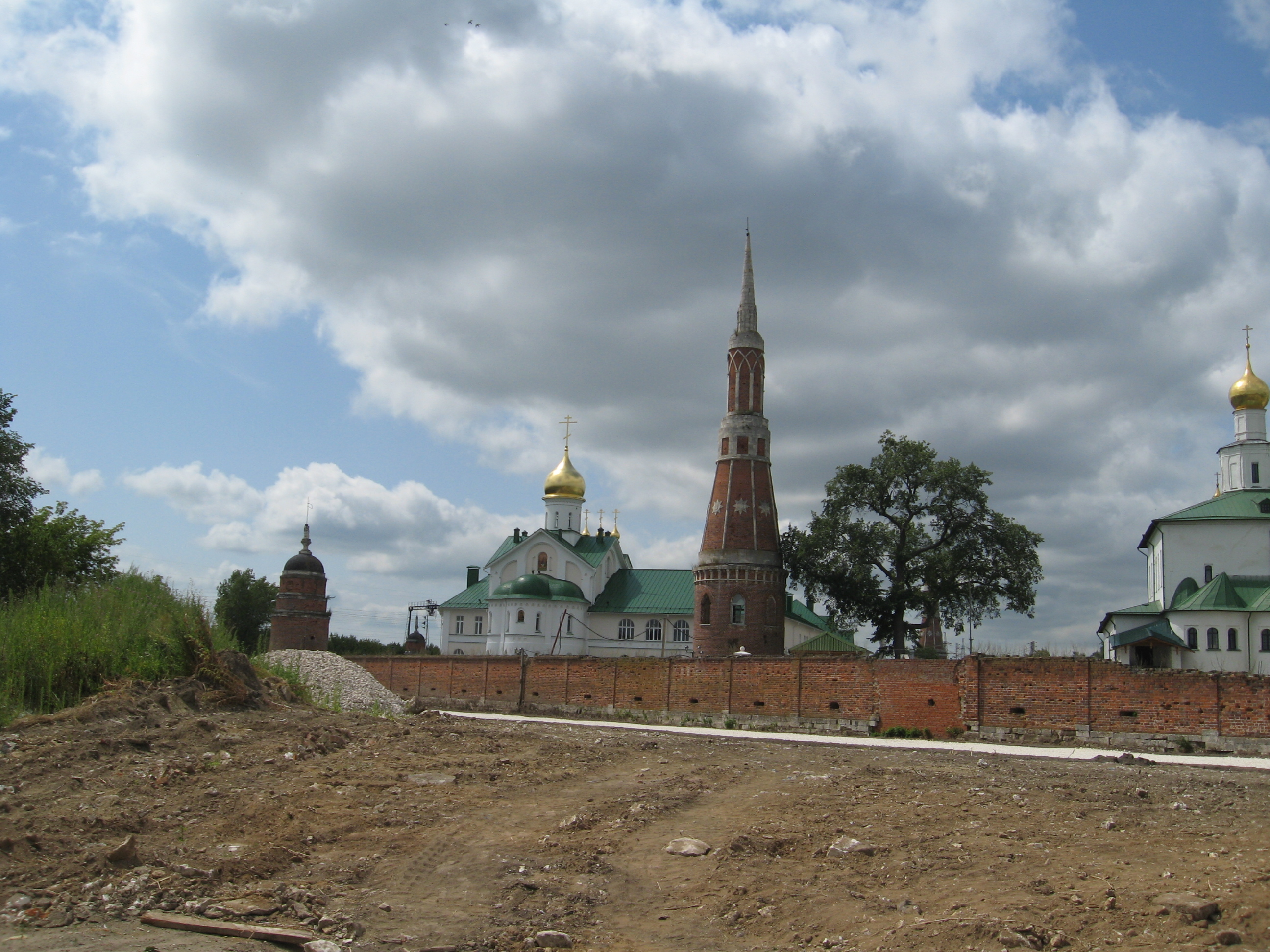 Семинария